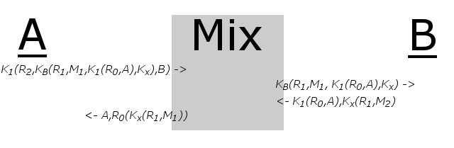 En enkel bild av en Chaum-mix